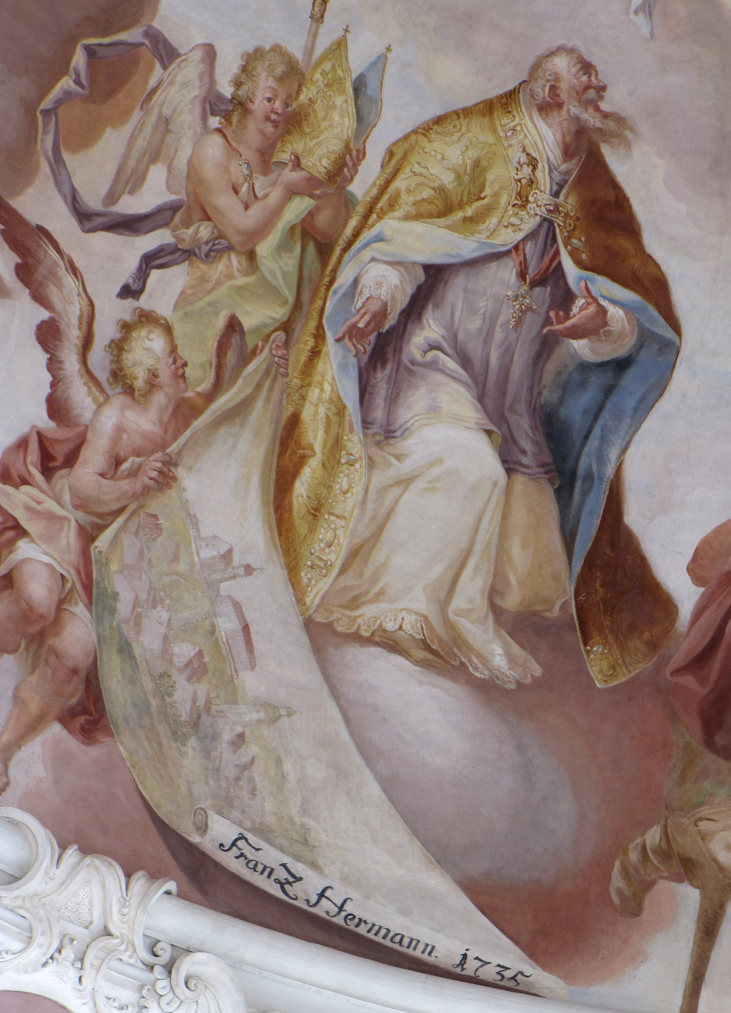 Detail des Kuppelfreskos in der Stadtpfarrkirche St. Martin, Marktoberdorf (Ostallgäu), von Franz (Georg) Hermann